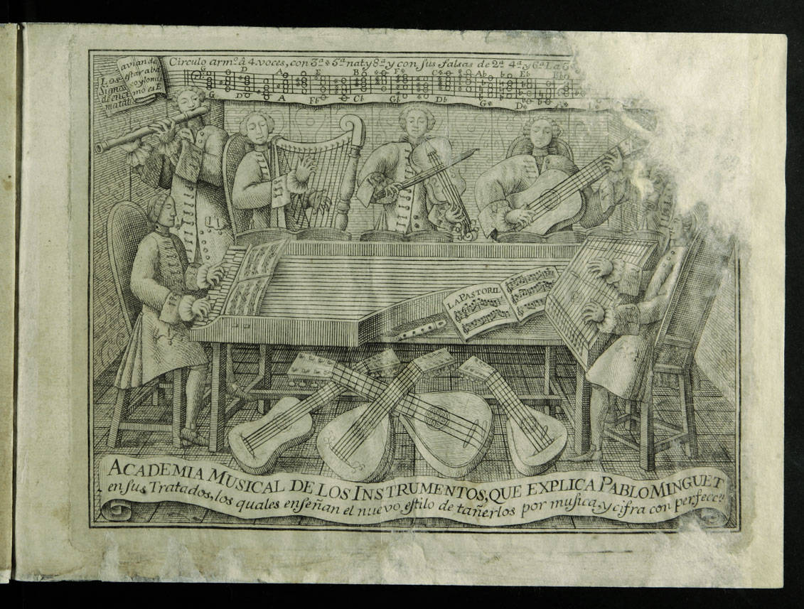 Reglas y advertencias generales que enseñan el modo de tañer todos los instrumentos mejores y mas usuales, como son la guitarra, tiple, vandola, cythara, clavicordio, organo, harpa, psalterio, bandurria, violin, flauta travesera, flauta dulce y la flautilla : con varios tañidos, danzas, contradanzas ... al estilo castellano, italiano, catalàn y francès ... de Pau Minguet i Irol